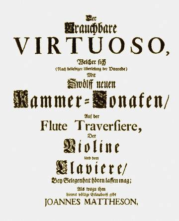 Mattheson strona tytułowa jednego z wydań jego sonat kameralnych. Zdjęcie pochodzi ze strony